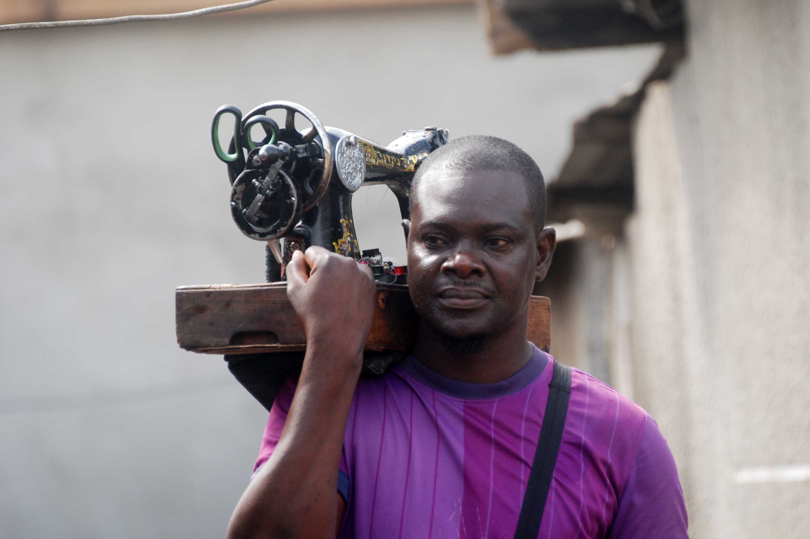 un couturier ambulant dans les rues d'Abidjan This is an image of "African people at work" from Ivory Coast